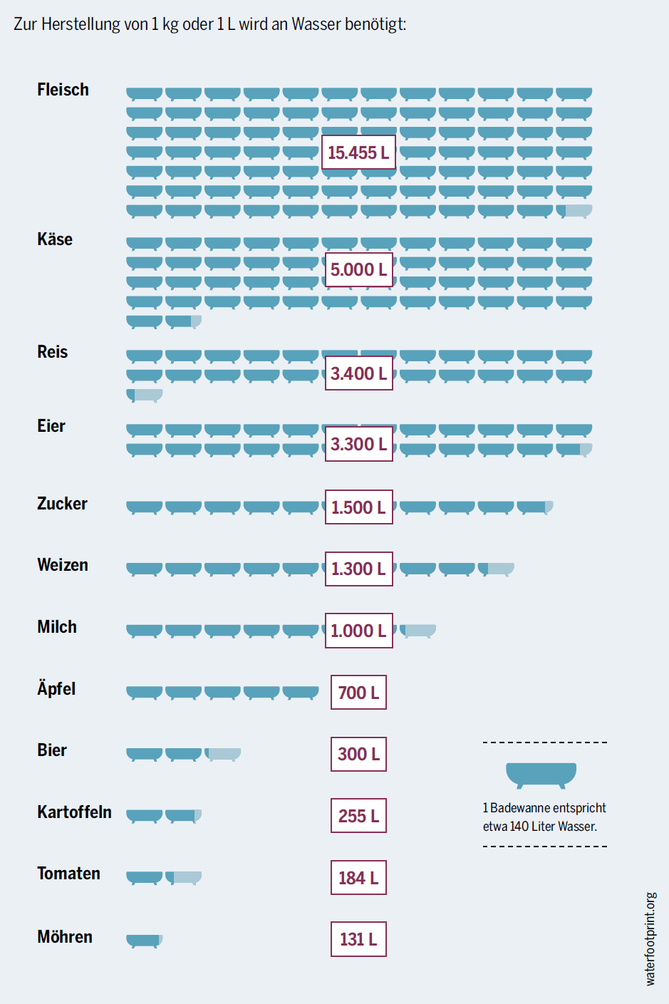 Wasserverbrauch zur Produktion von einem Kilo Fleisch, Quelle: Fleischatlas der Heinrich-Böll-Stiftung, BUND, Le Monde diplomatique